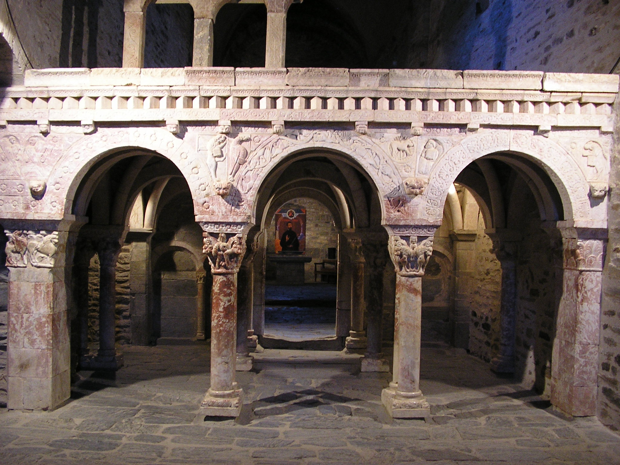 Tribuna del Priorat de Santa Maria de Serrabona. Source: Makinal